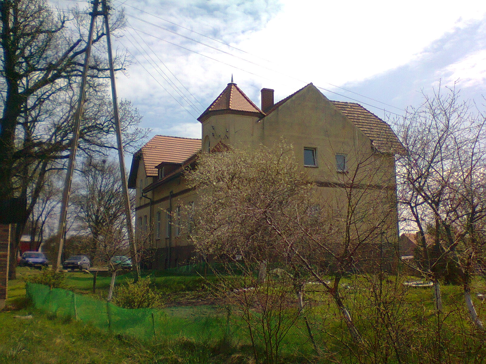 świetlica w Marszowie